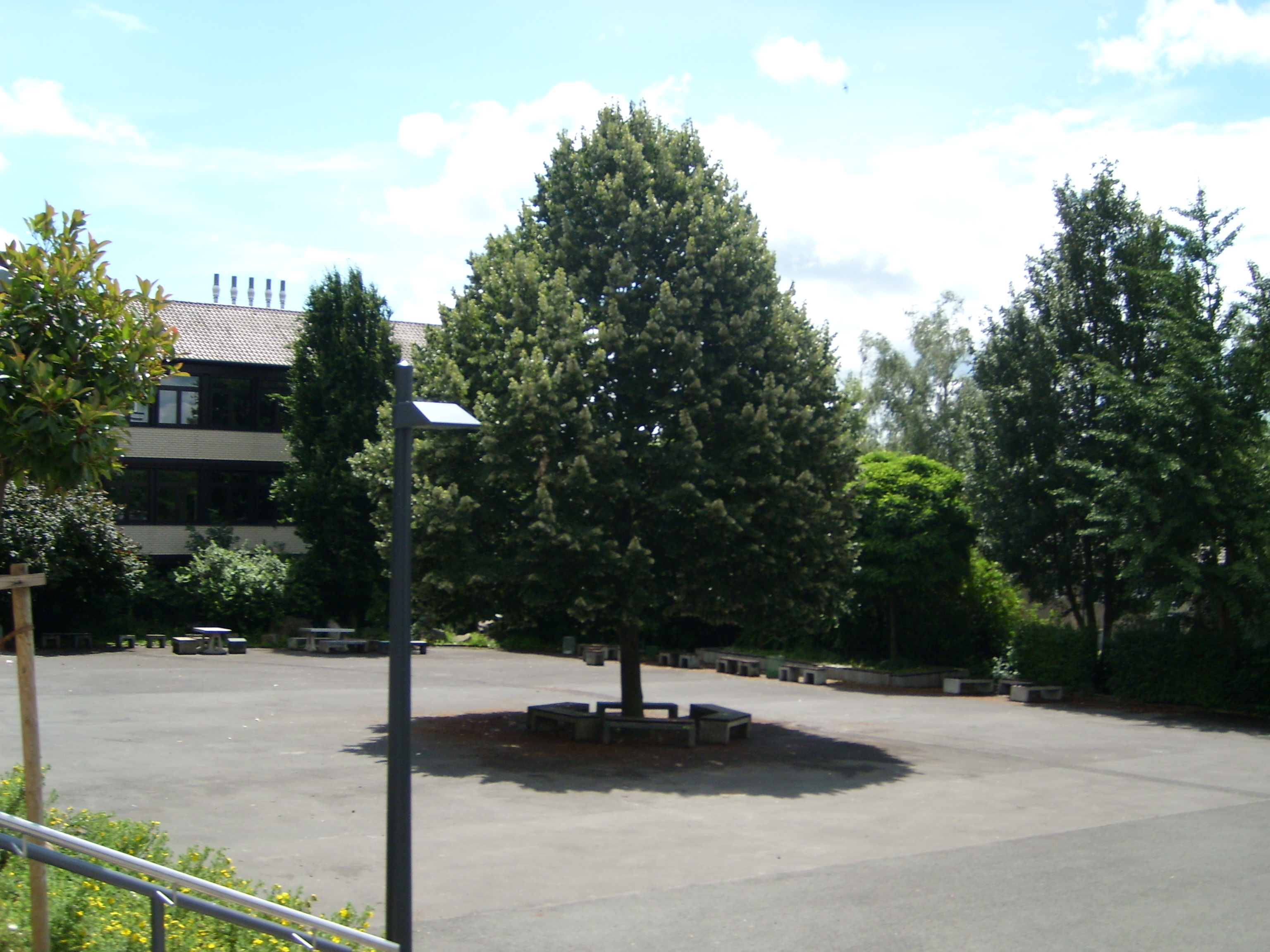 Der vordere Pausenhof des Kaiserin-Friedrich-Gymnasiums